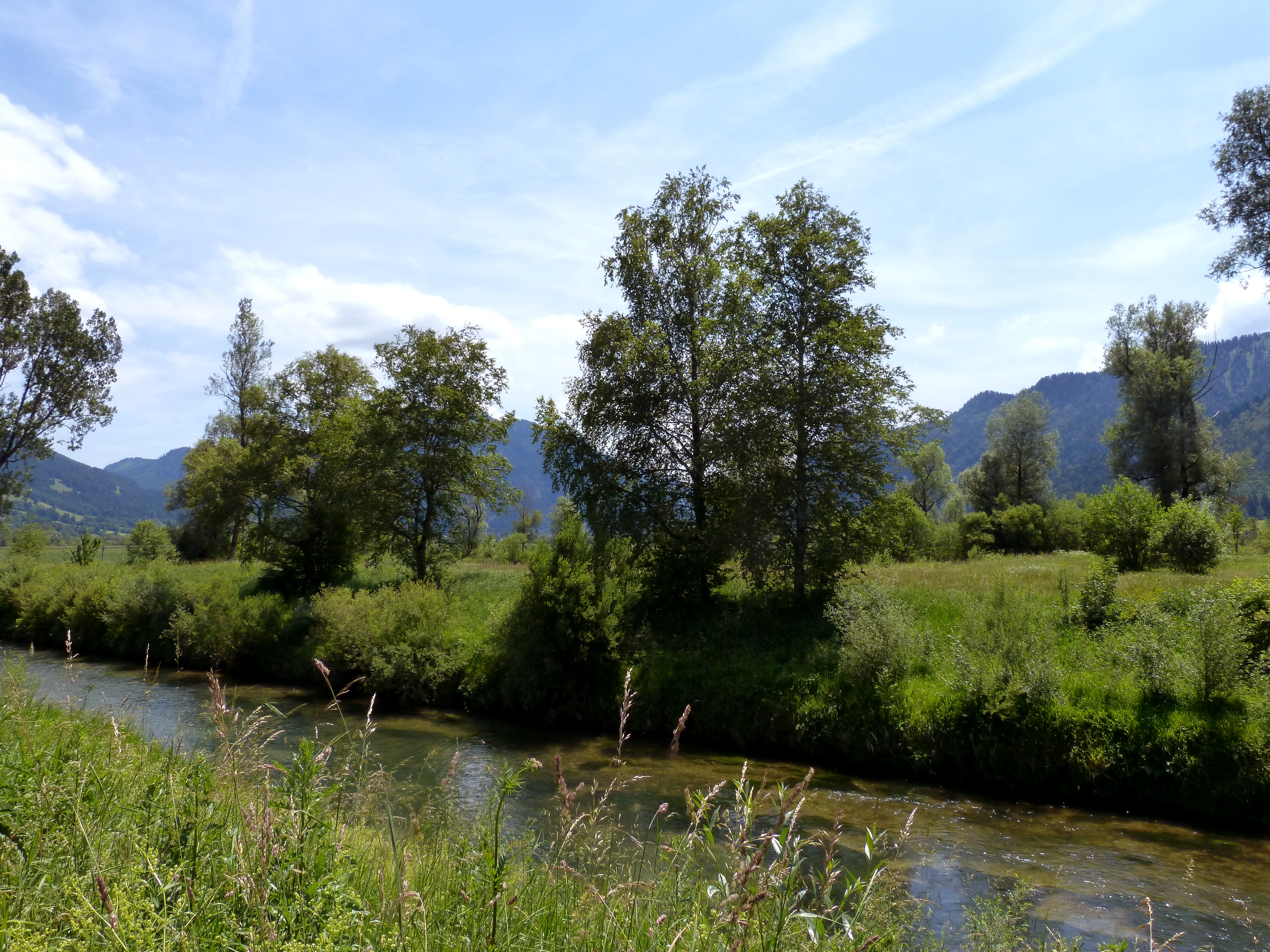 Blick über die Ammer in das Naturschutzgebiet „Pulvermoos“.